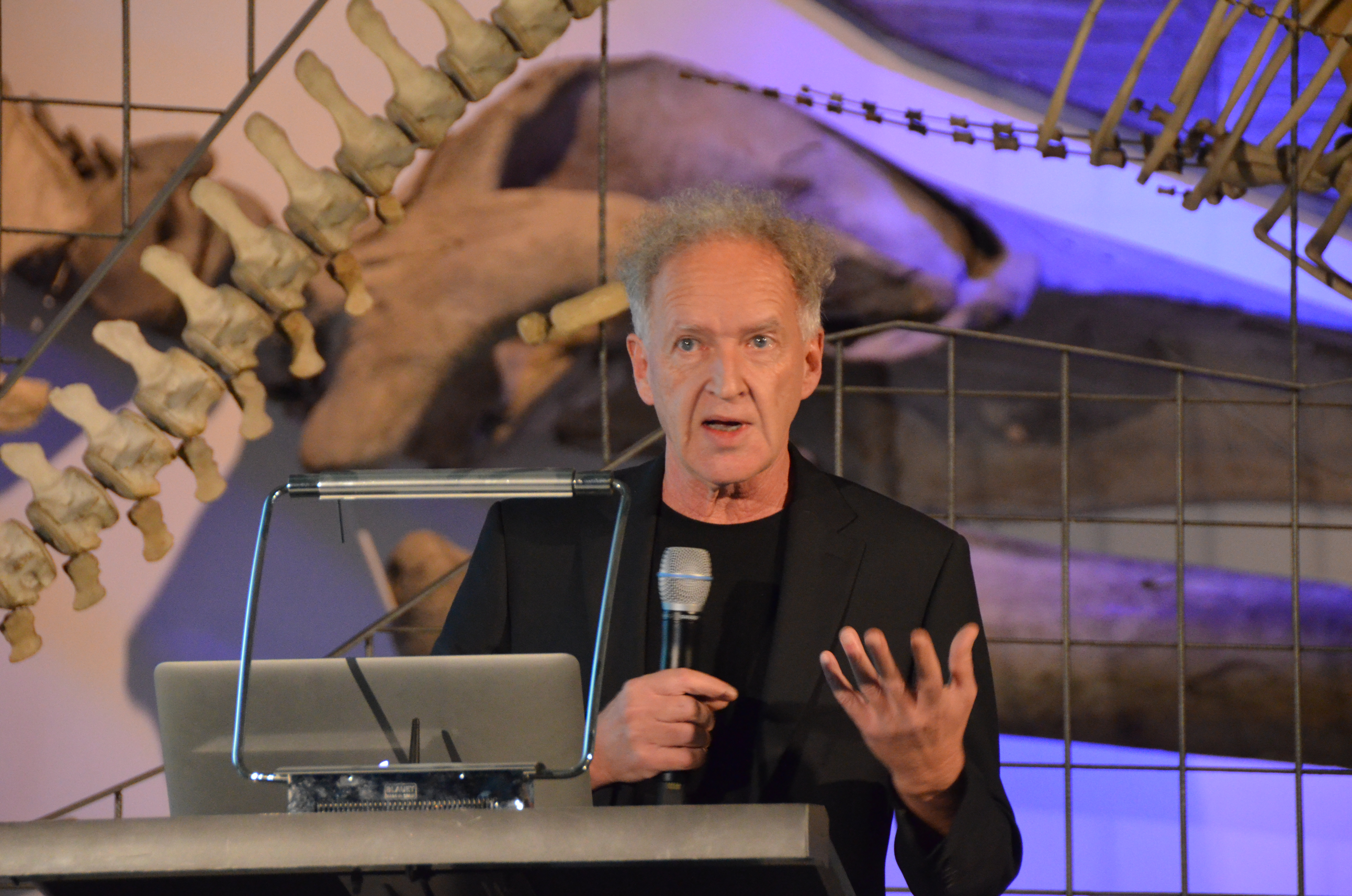 Friedemann Schrenk during the 15th Koenigswald-Lecture at the Naturmuseum Senckenberg in 2016.